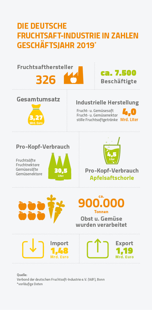 Die deutsche Fruchtsaftindustrie in Zahlen 2019